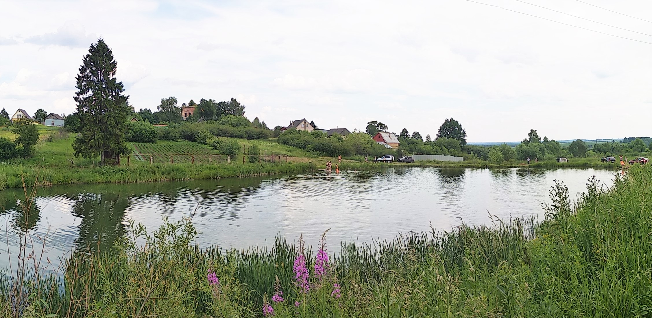 Село Зверинец (Ярославская область) вид с дороги на пруд и Троицкую церковь.